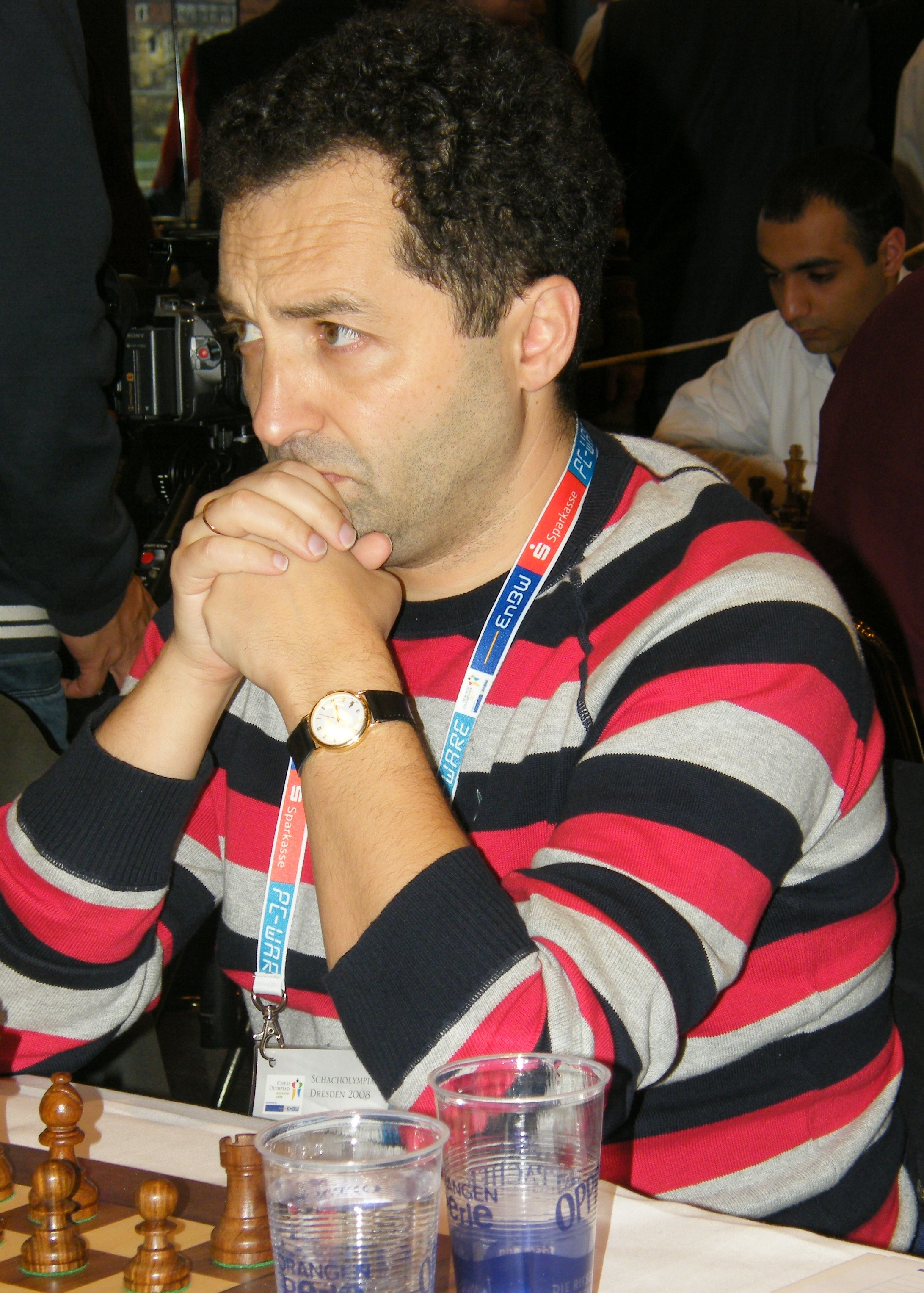 Jewgenij Agrest bei der 38. Schacholympiade in Dresden 2008